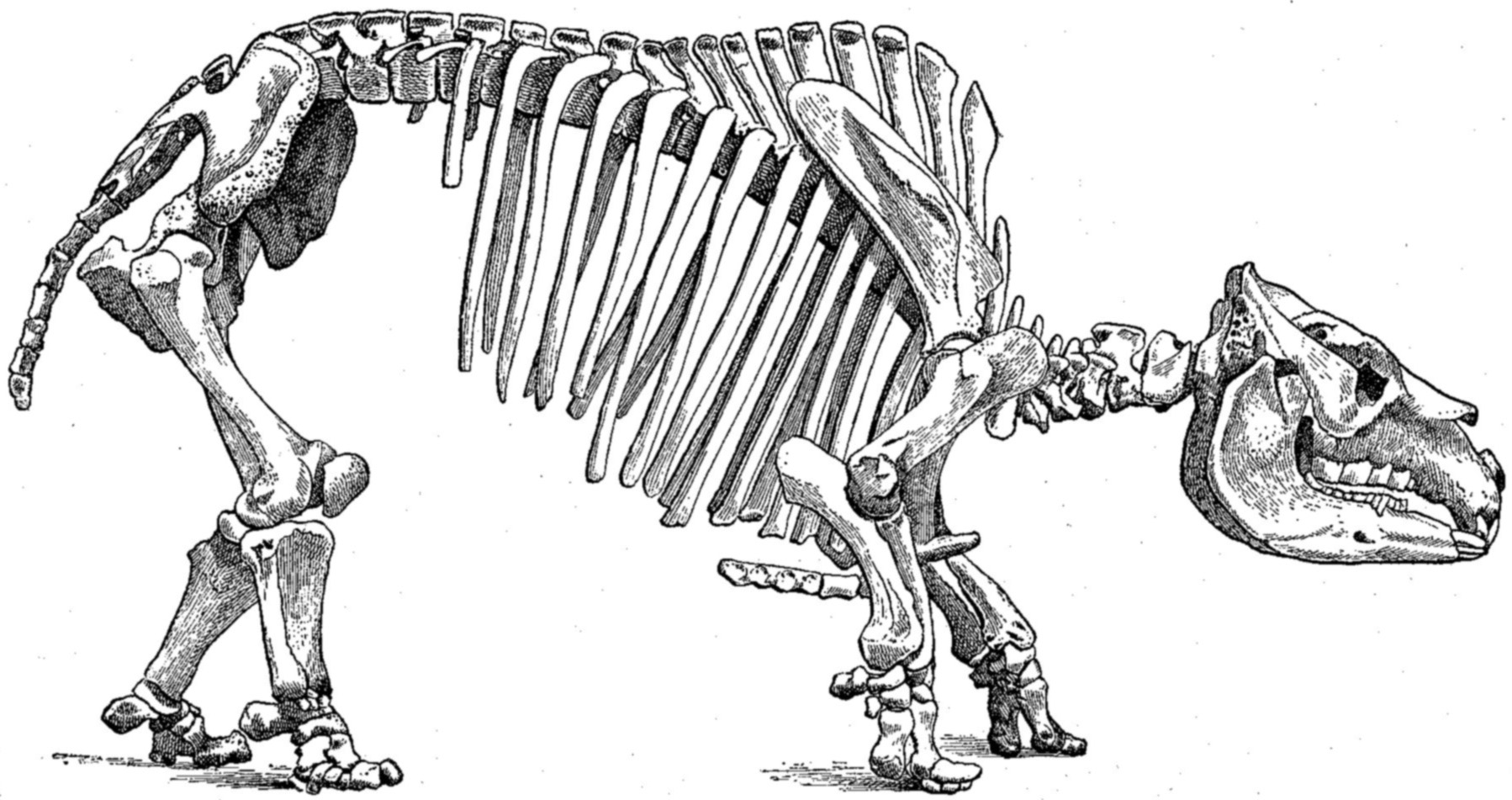 Toxodon skeleton.